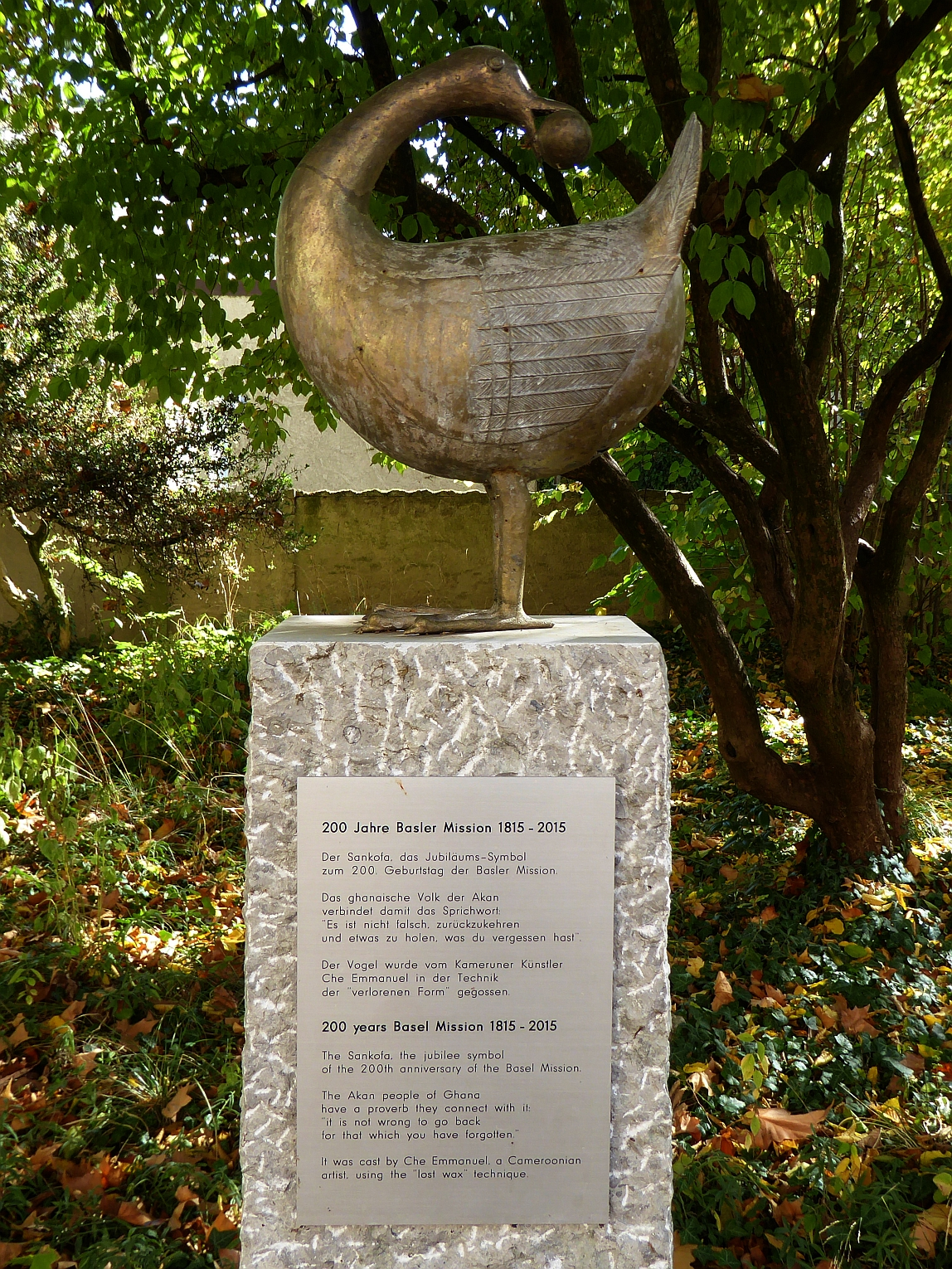 1815 - 2015, 200 Jahre Basler Mission, Hotel Bildungszentrum 21